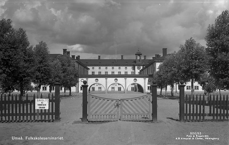 Folkskoleseminariet.; Byggnadsverk; Skola; Utbildning och vetenskap